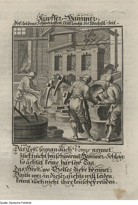 Original image description from the Deutsche Fotothek Ständebuch & Schmiede & Kupferschmiede & Kupfer & Hammer